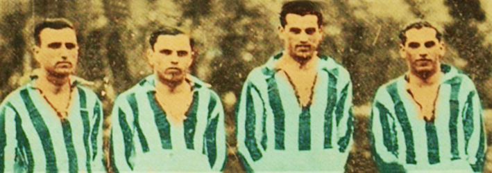 Οι αδερφοί Ανδριανόπουλοι Γιάννης, Ντίνος, Γιώργος, Βασίλης